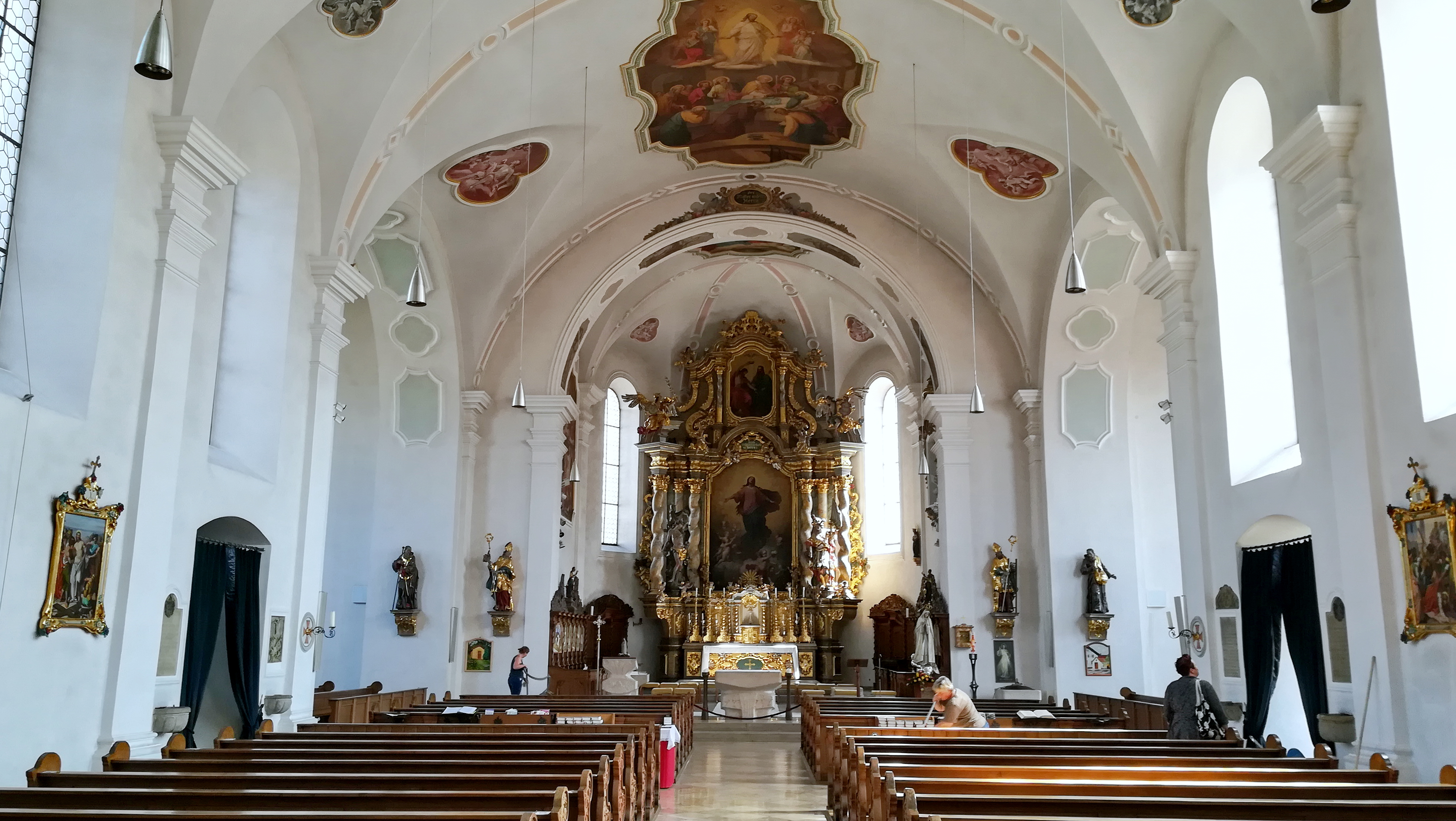 Die Stadtpfarrkirche Mariä Himmelfahrt ist eine katholische Pfarrkirche in der Stadt Furth im Wald.